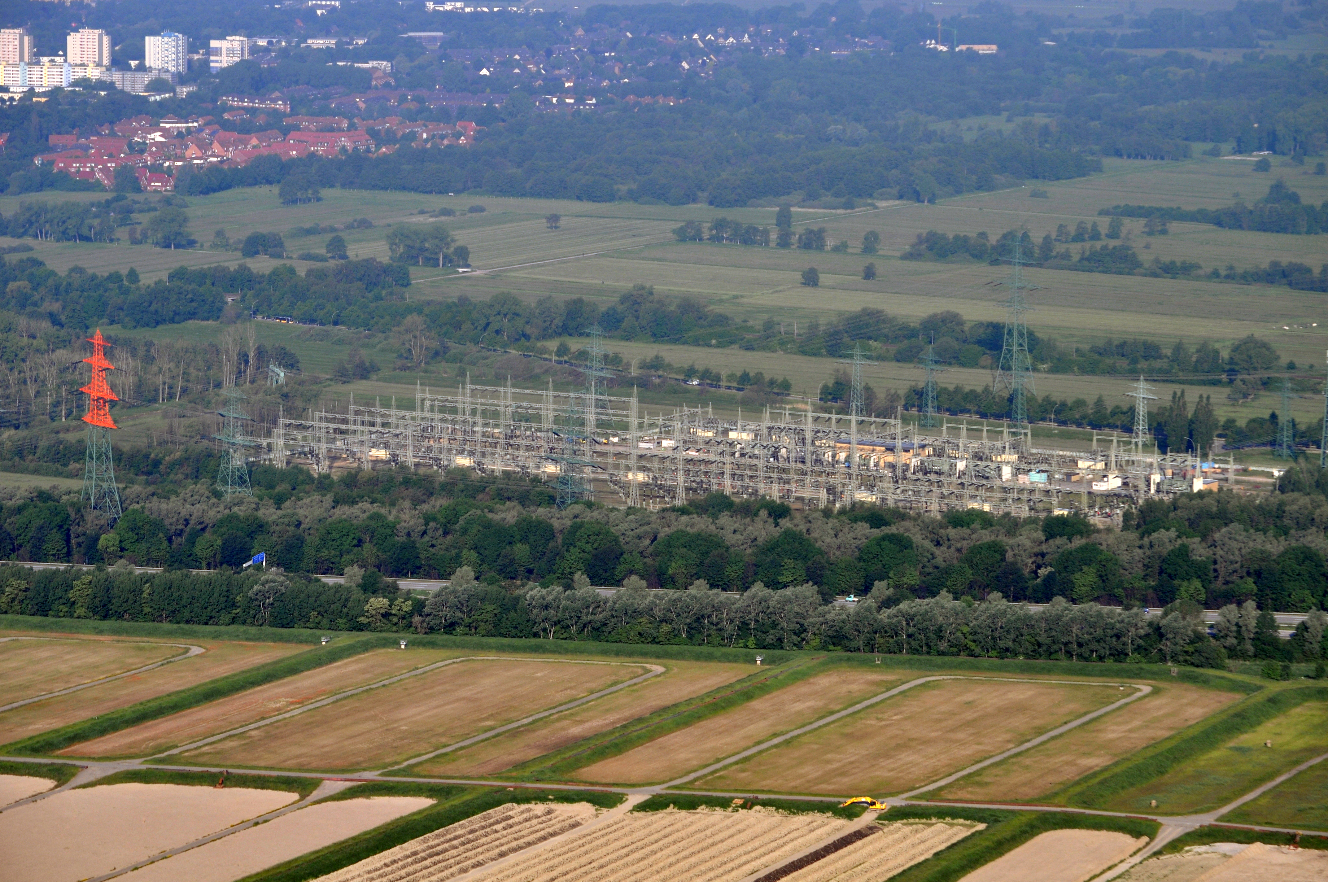 Umspannwerk Hamburg-Süd in Hamburg-Moorburg, im Vordergrund das Spülfeld Moorburg-Mitte